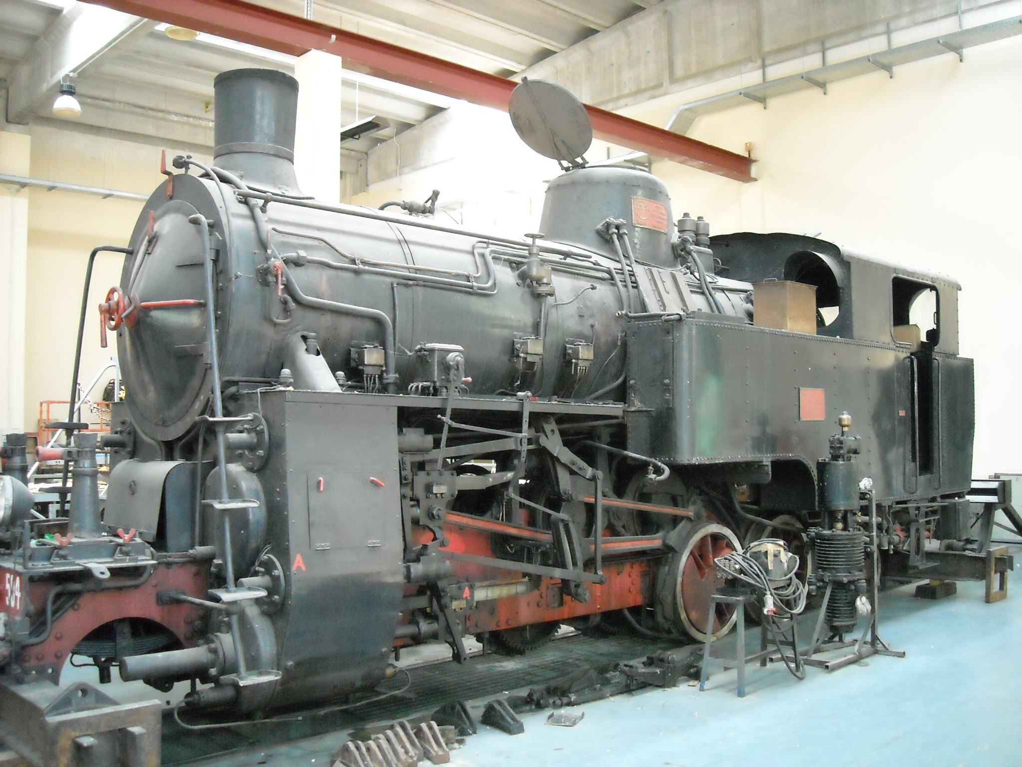 Locomotiva FCL 504 in manutenzione a Cosenza